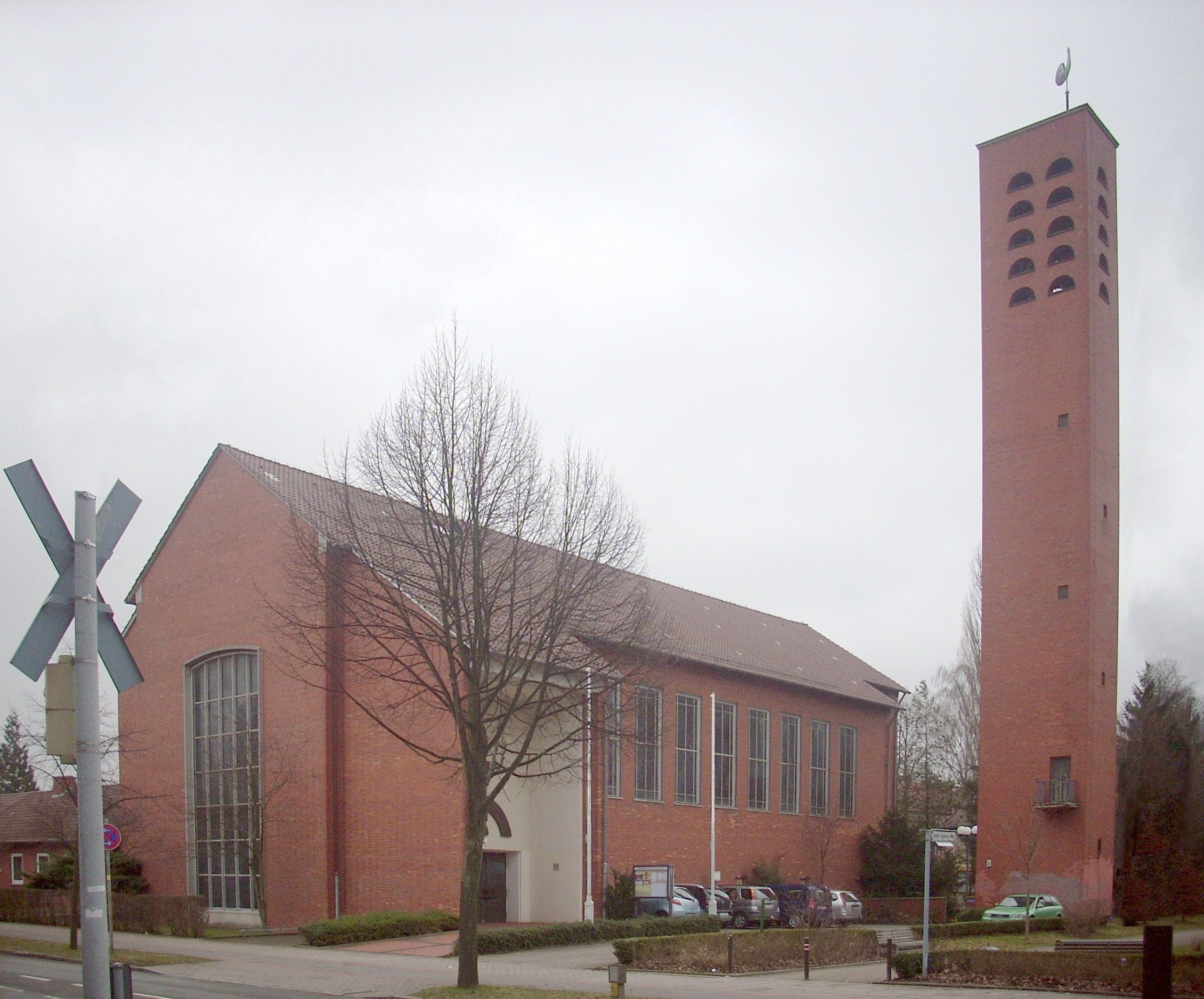 Hannover-Mittelfeld, Kath. Kirche St. Eugenius